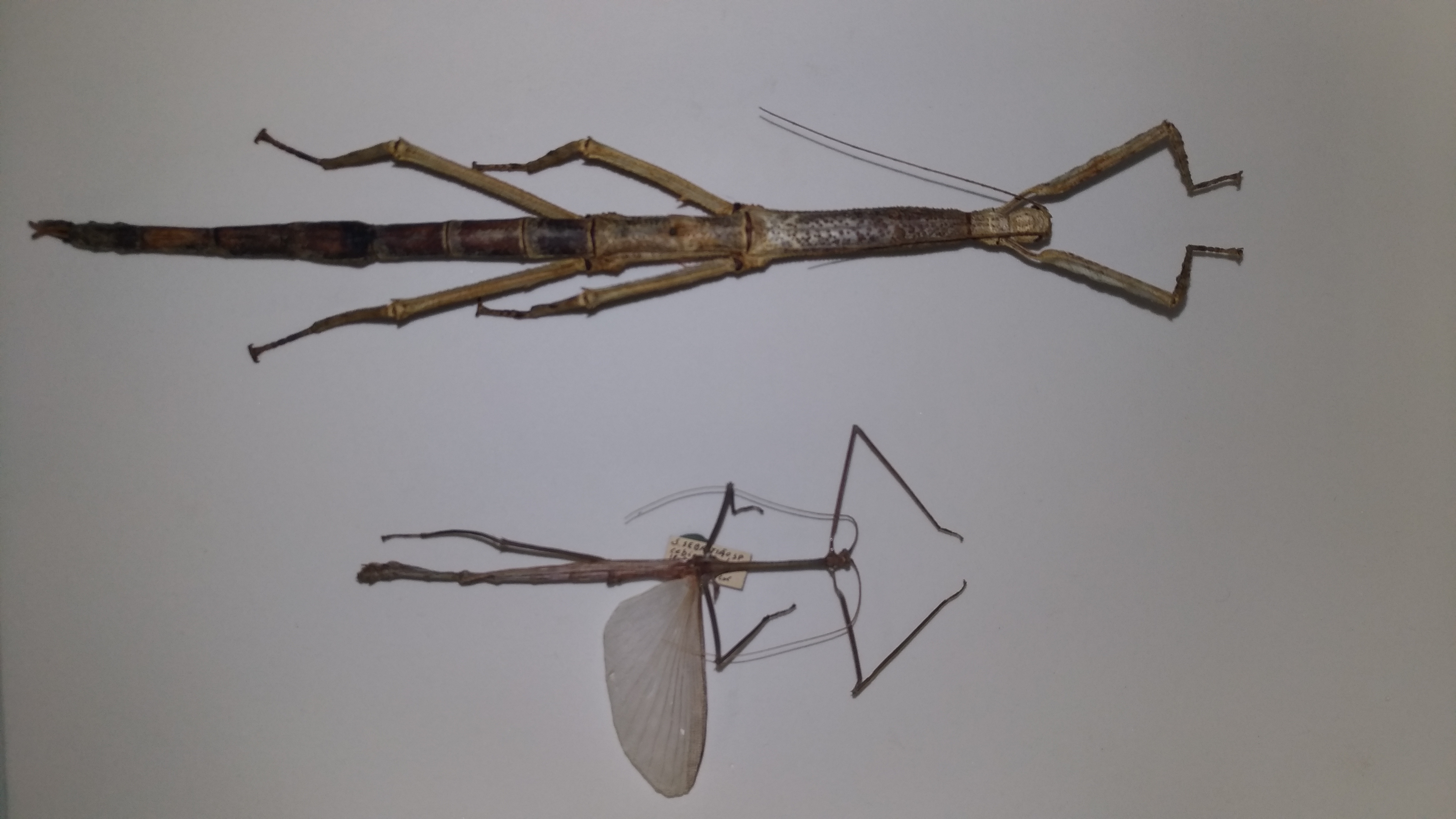 Casal de Cladomorphus phyllinus. Acima na foto, uma fêmea; abaixo na foto, um macho. Indivíduos da coleção do Departamento de Zoologia da Universidade de São Paulo(USP)